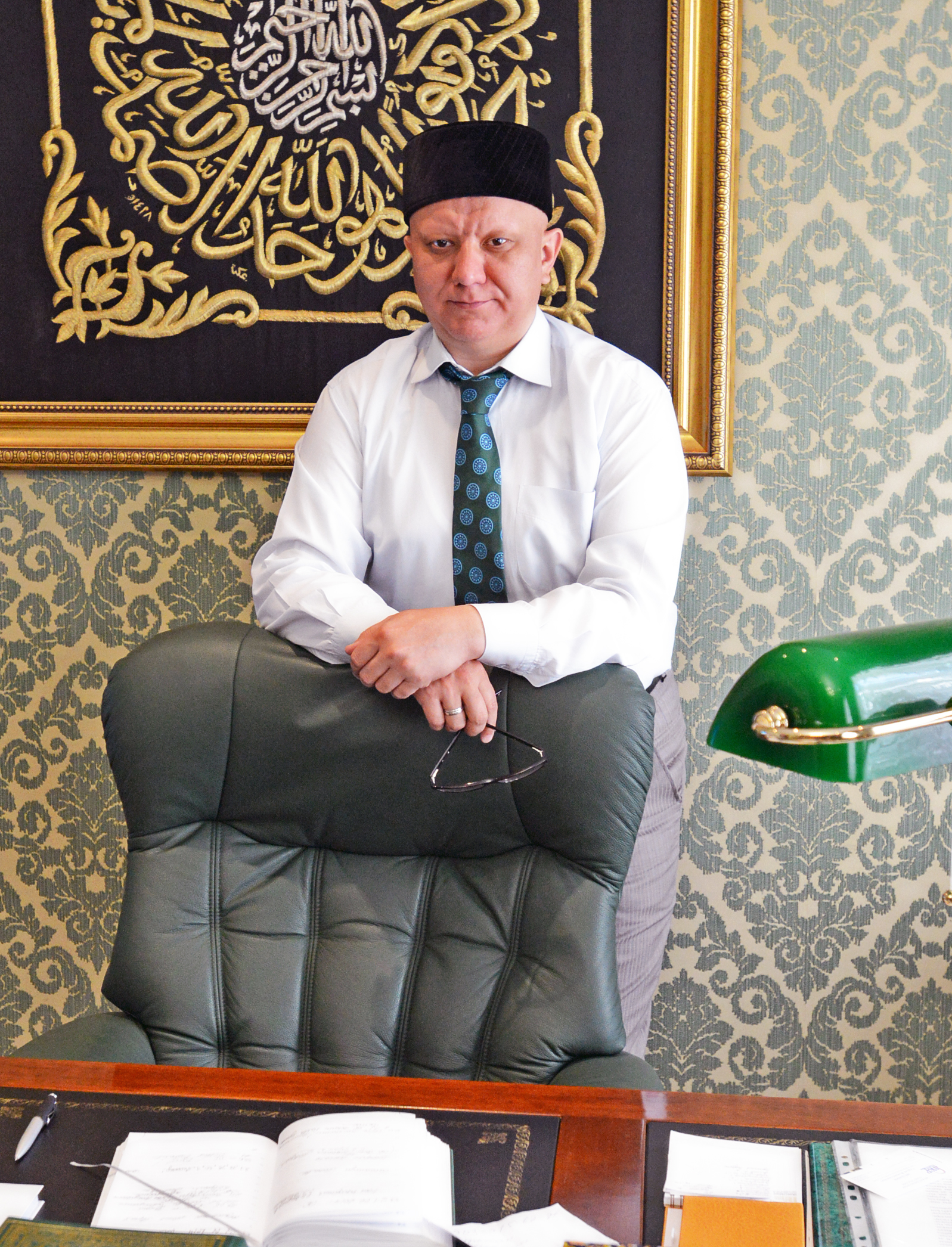 Муфтий